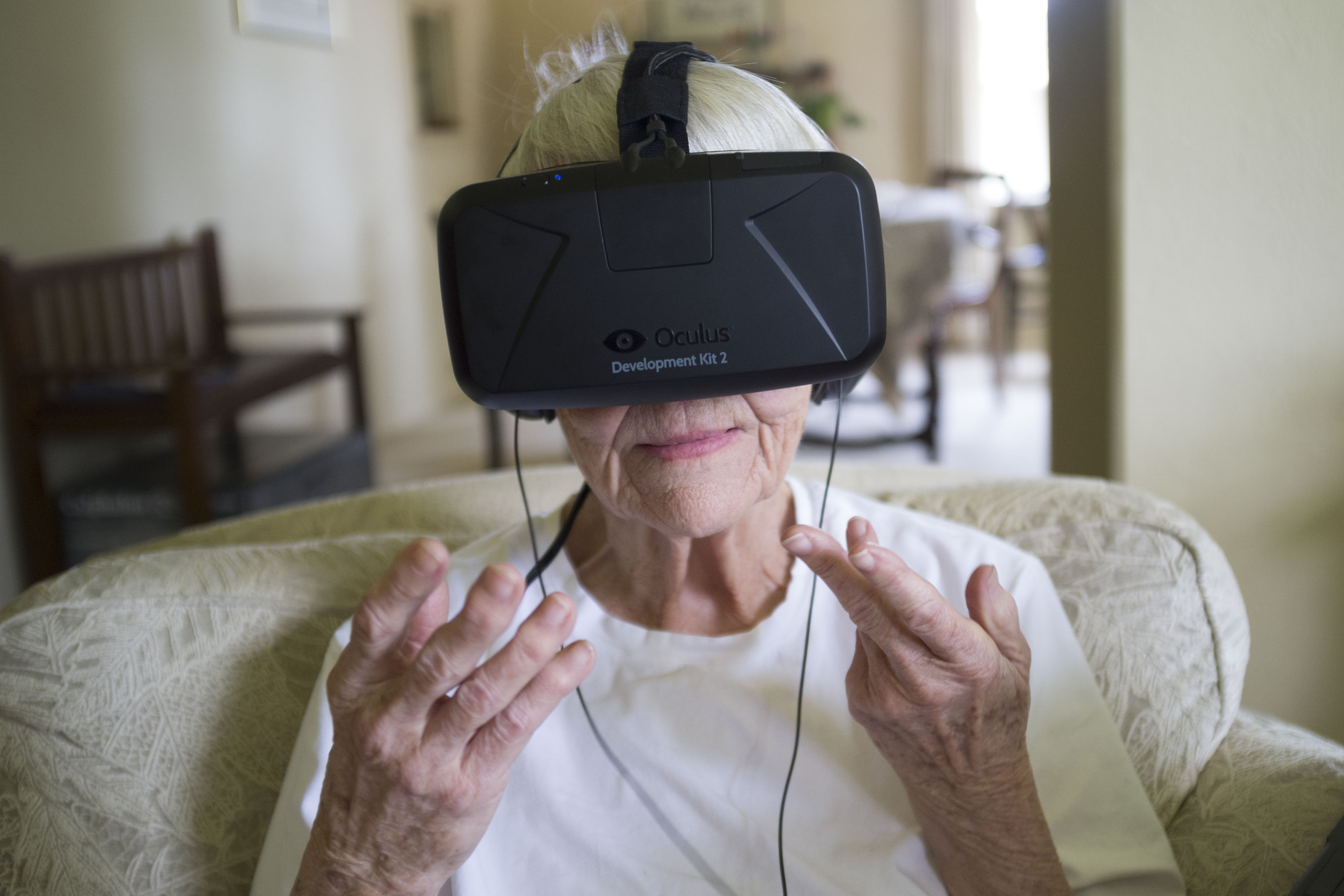 Spring 2015